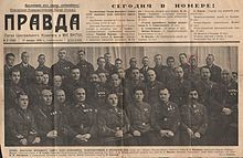 Группа депутатов Верховного Совета СССР - командиров, политработников и красноармейцев среди них: Нарком Обороны СССР, Маршал Советского Союза К.Е.Ворошилов, Заместитель Наркома Обороны СССР, Маршал Советского Союза А.И.Егоров, Начальник Политуправления РККА армейский комиссар 2-го ранга Л.З.Мехлис, армейский комиссар 2-го ранга Е.А.Шаденко, Начальник Генштаба РККА, командир 1-го ранга Б.М.Шапошников, командующий Московским военным округом Маршал Советского Союза С.М.Буденный, капитан заместитель командира по политчасти Киргизского Кавалерийского полка РККА Мамат Нурбаев и другие.